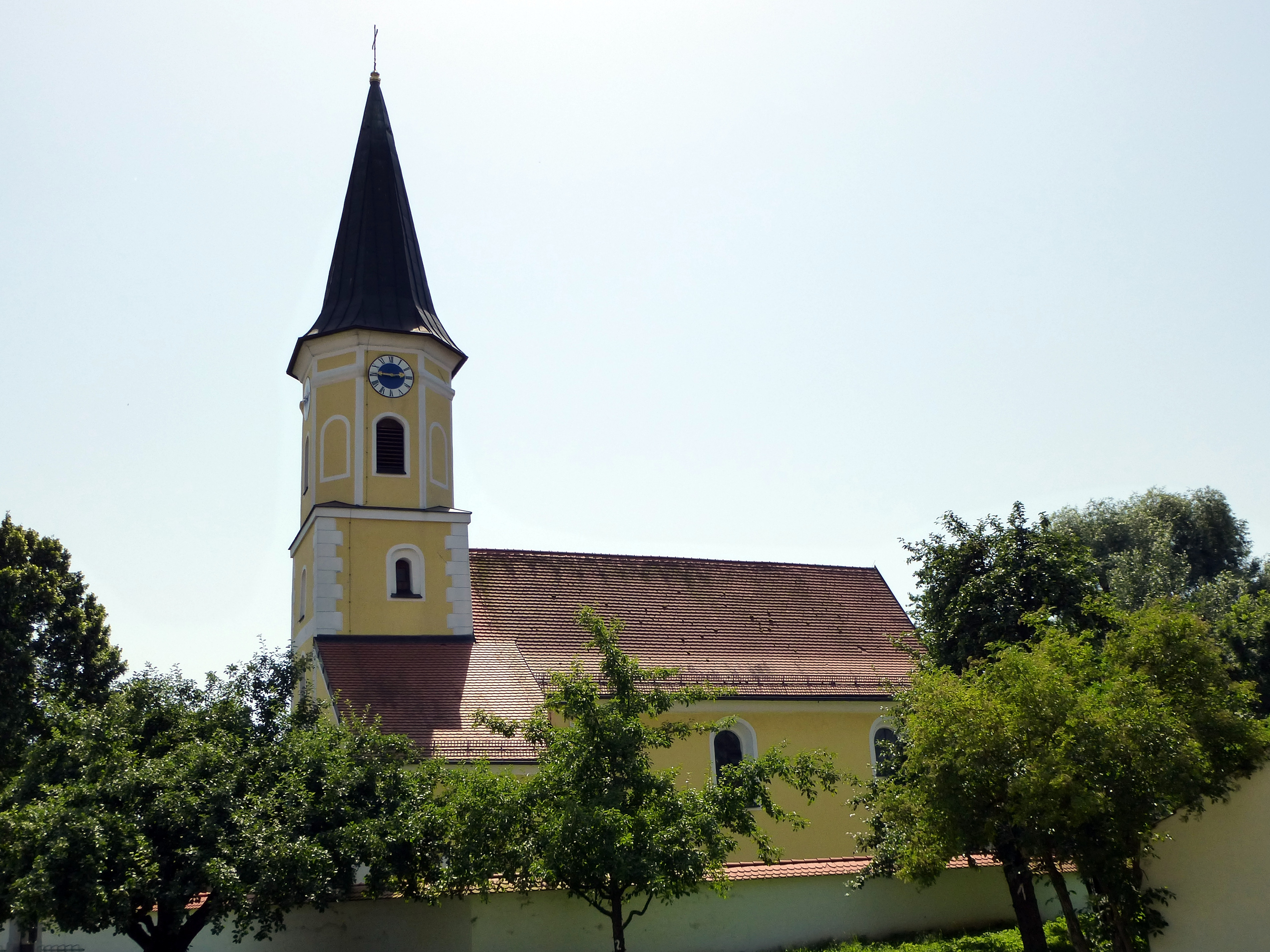 Kath. Filialkirche Jakobus d.Ä. in Kiefenholz, Wörth a.d.Donau